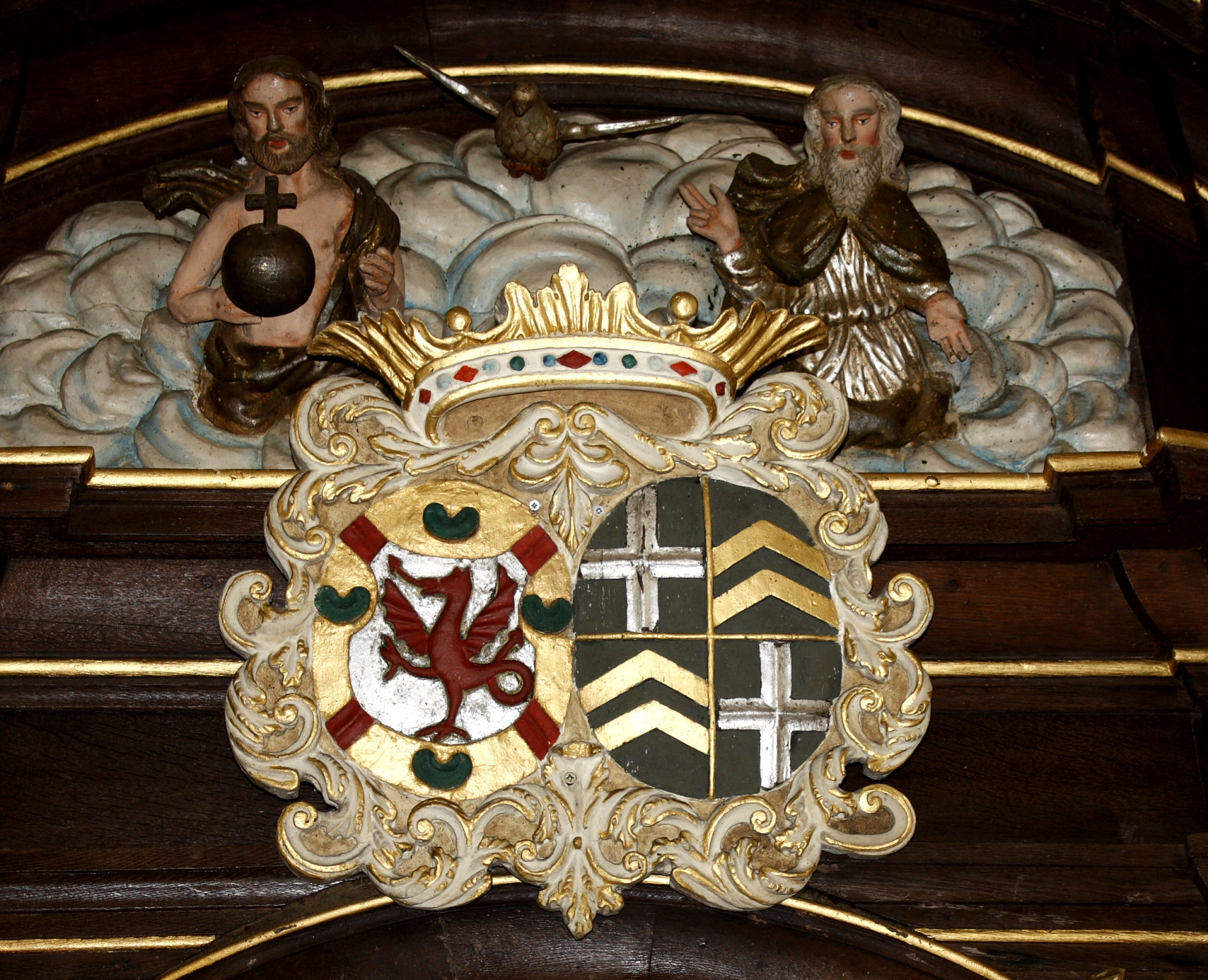 Ehewappen von Carl Friedrich Melchior Freiherr von Kesselstatt und Isabella Maria Theresia Freiin Raitz von Frentz - 18. Jht. am Altar der Kesselstatt Kapelle in Kröv.